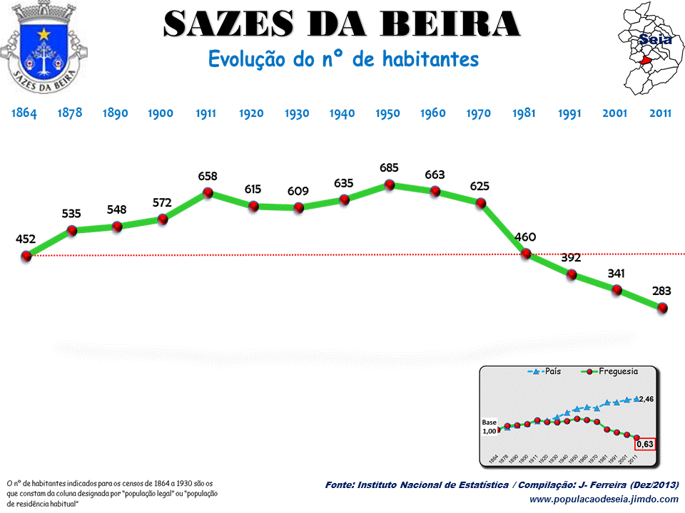 Evolução da População 1864 / 2011